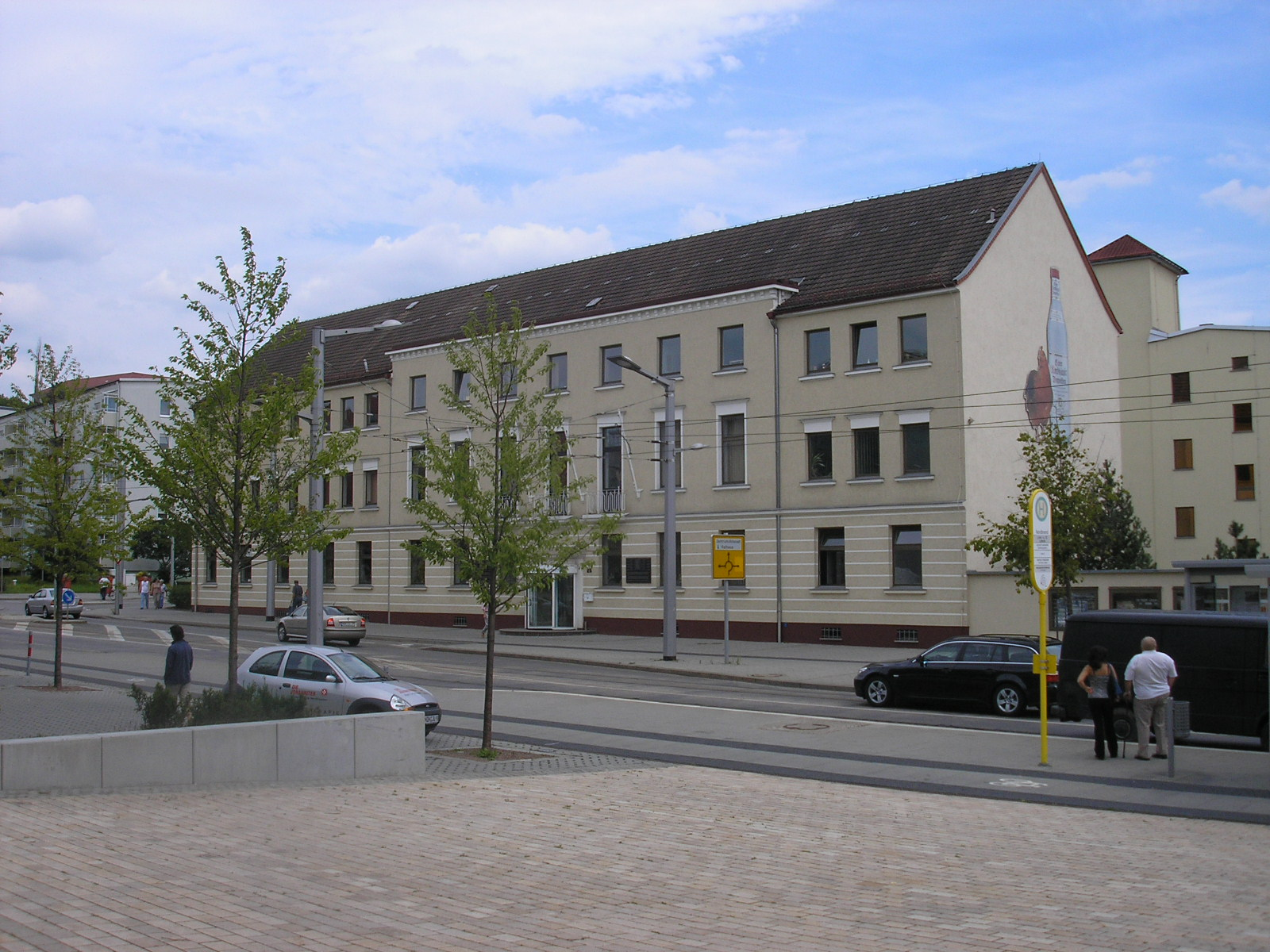 Das Gebäude der Nordbrand-Schnapsbrennerei in Nordhausen (Thüringen).